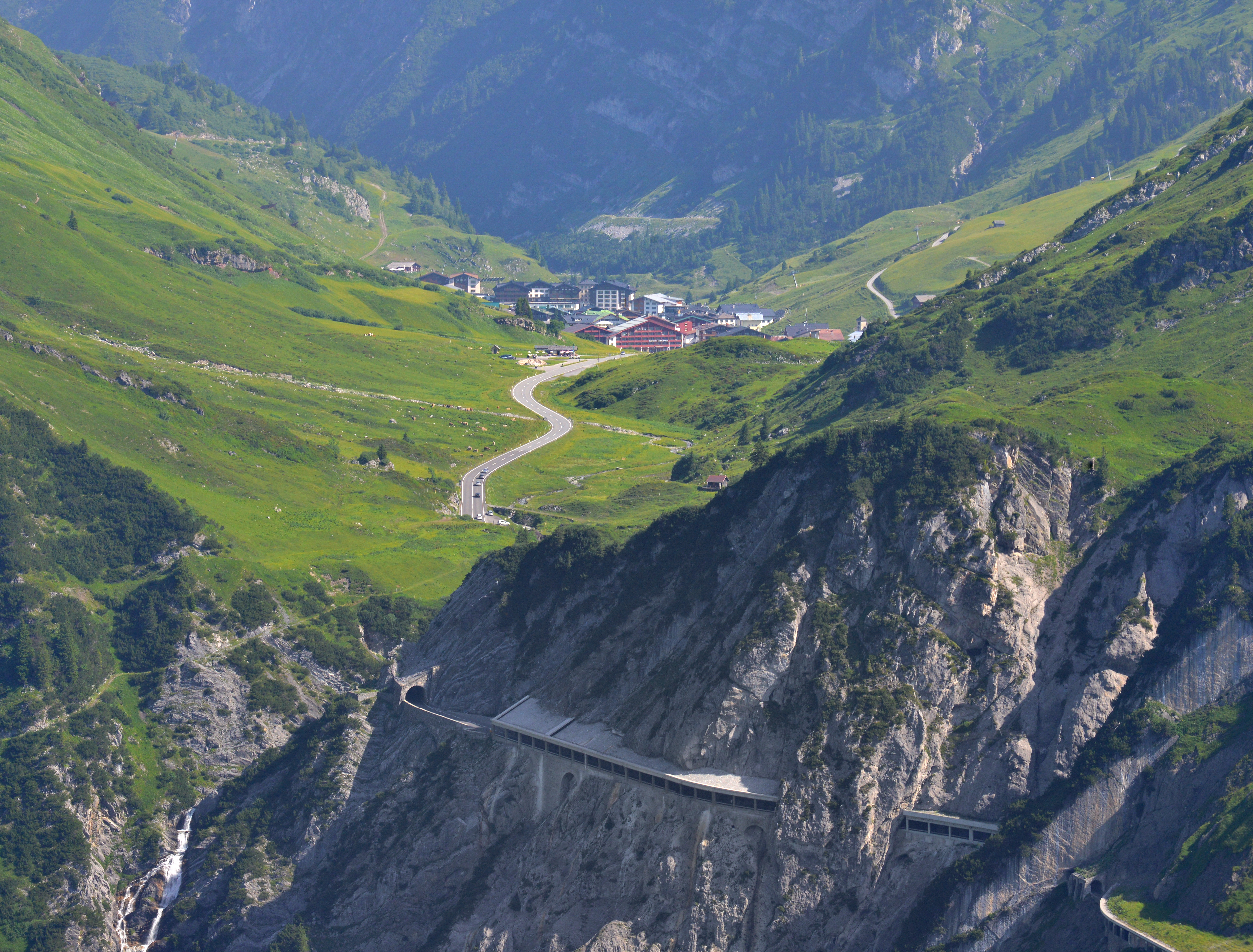 Blick von der Stubinger Alpe auf Zürs und den Flexenpass.